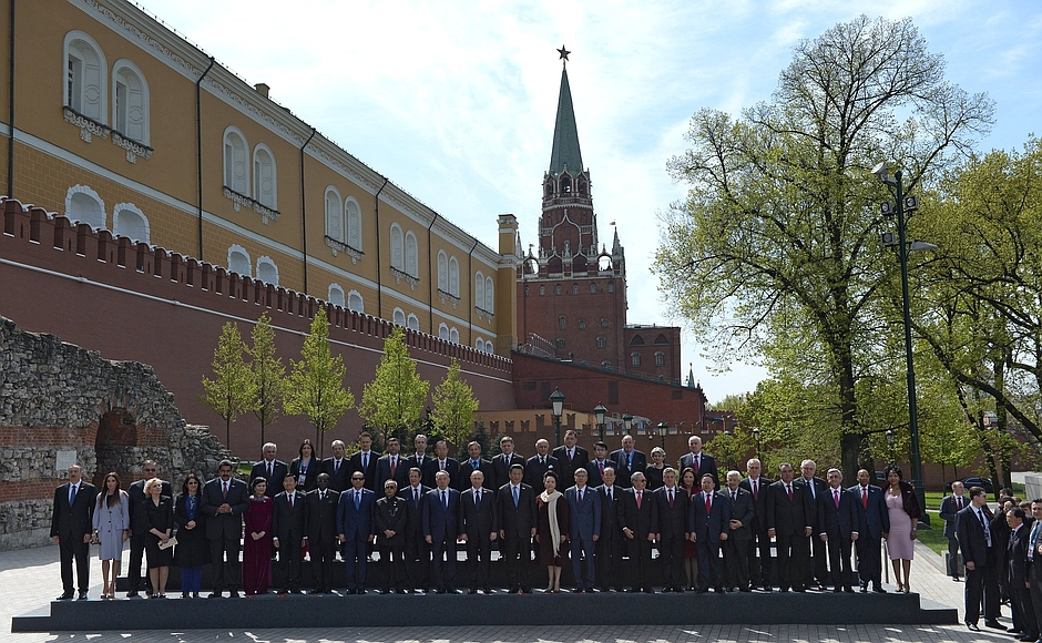 С главами иностранных государств и правительств, прибывшими в Москву на празднование 70-летия Победы.